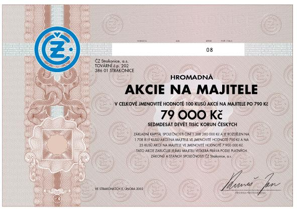 Ukázka hromadné listinné akcie